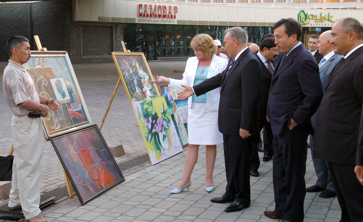 Фотография с выставки художников в день города